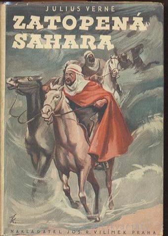 Původní ilustrace na obálce českého vydání románu J. Verna z roku 1926 v nakladatelství Josef R. Vilímek, Praha.